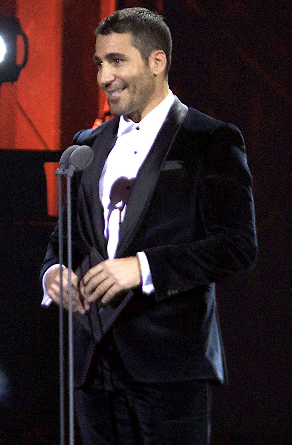 En el Teatro de la Ciudad Esperanza Iris, se realizó la entrega de Premios Fénix a lo más destacado de la cinematografía Iberoamericana, en la ceremonia actores, directores y personalidades del mundo cinematográfico, presentadores hicieron entrega de los premios. Asimismo se realizaron espectáculos musicales.